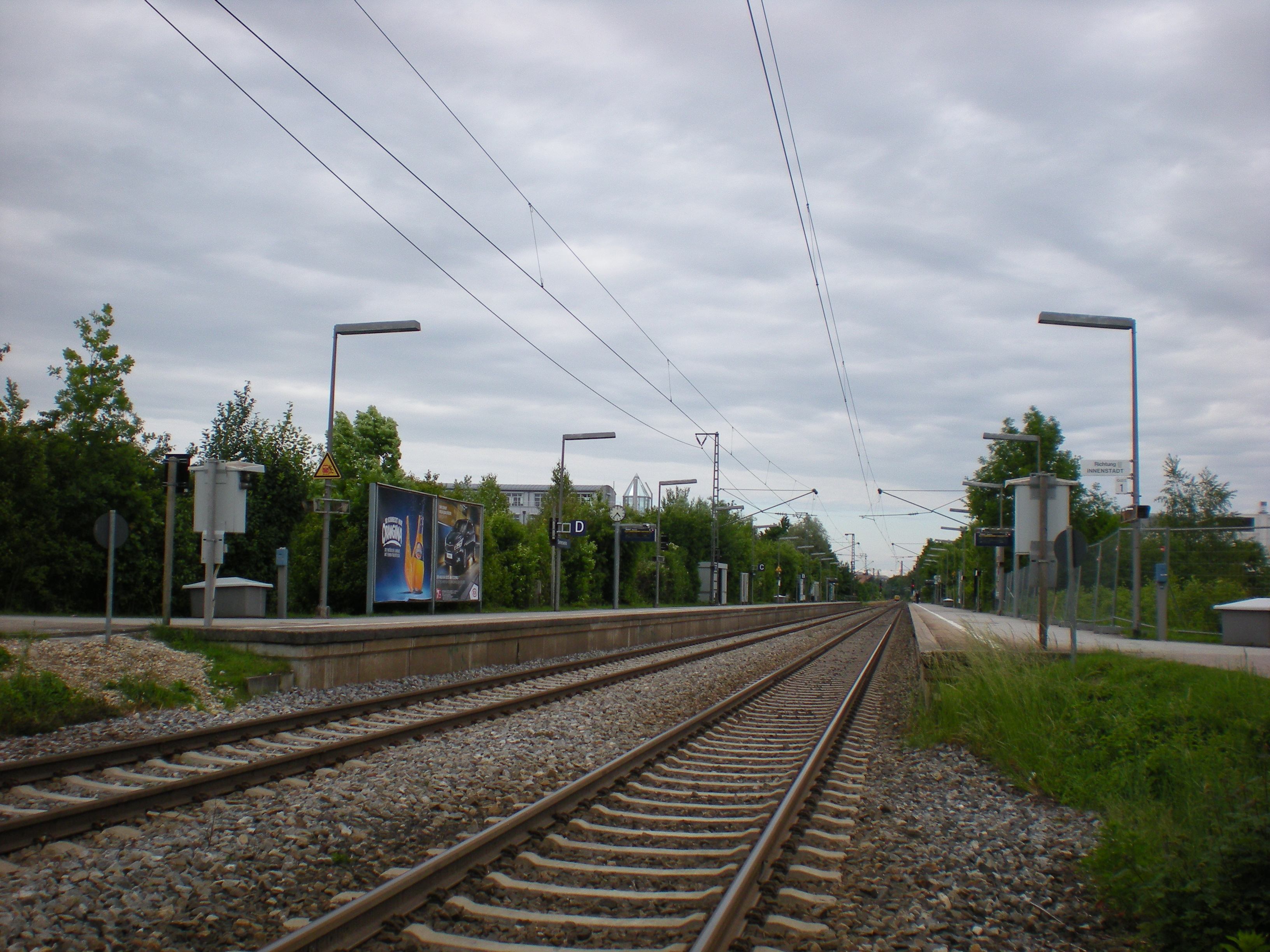 Bahnsteige des S-Bahnhaltepunkts München Siemenswerke